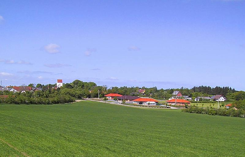 Udsigt til Vammen fra Lille høj